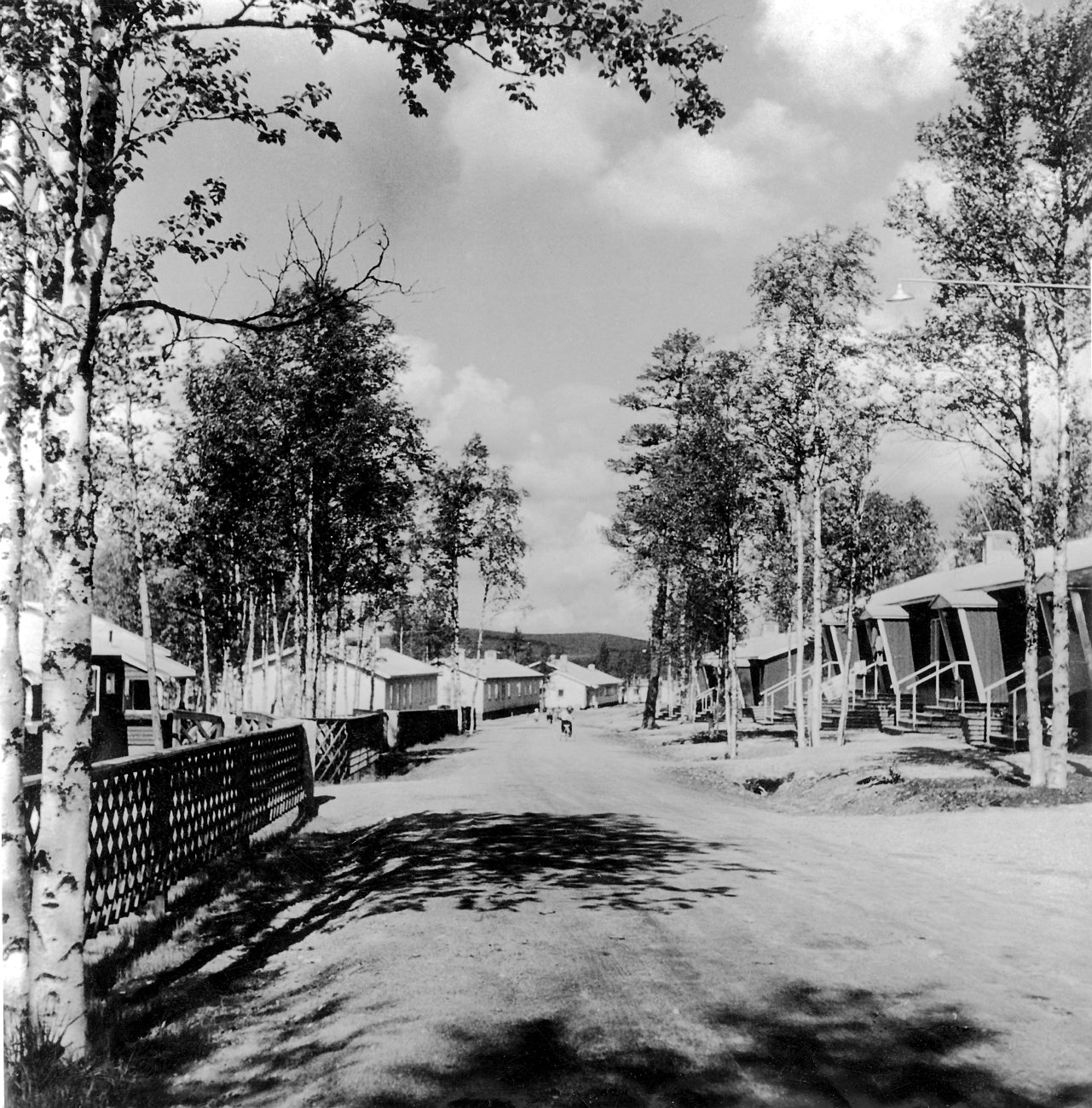 DIG3338 Harsprångets kraftstation. I Harsprånget byggde och bodde, då ruschen var som störst, 2134 personer. Harsprångets Powerplant. In Harsprånget, Jockmock, Sweden, lived when the rusch was the biggest, 2134 people. Photo:Okänd/ Unknown, 1945-1952